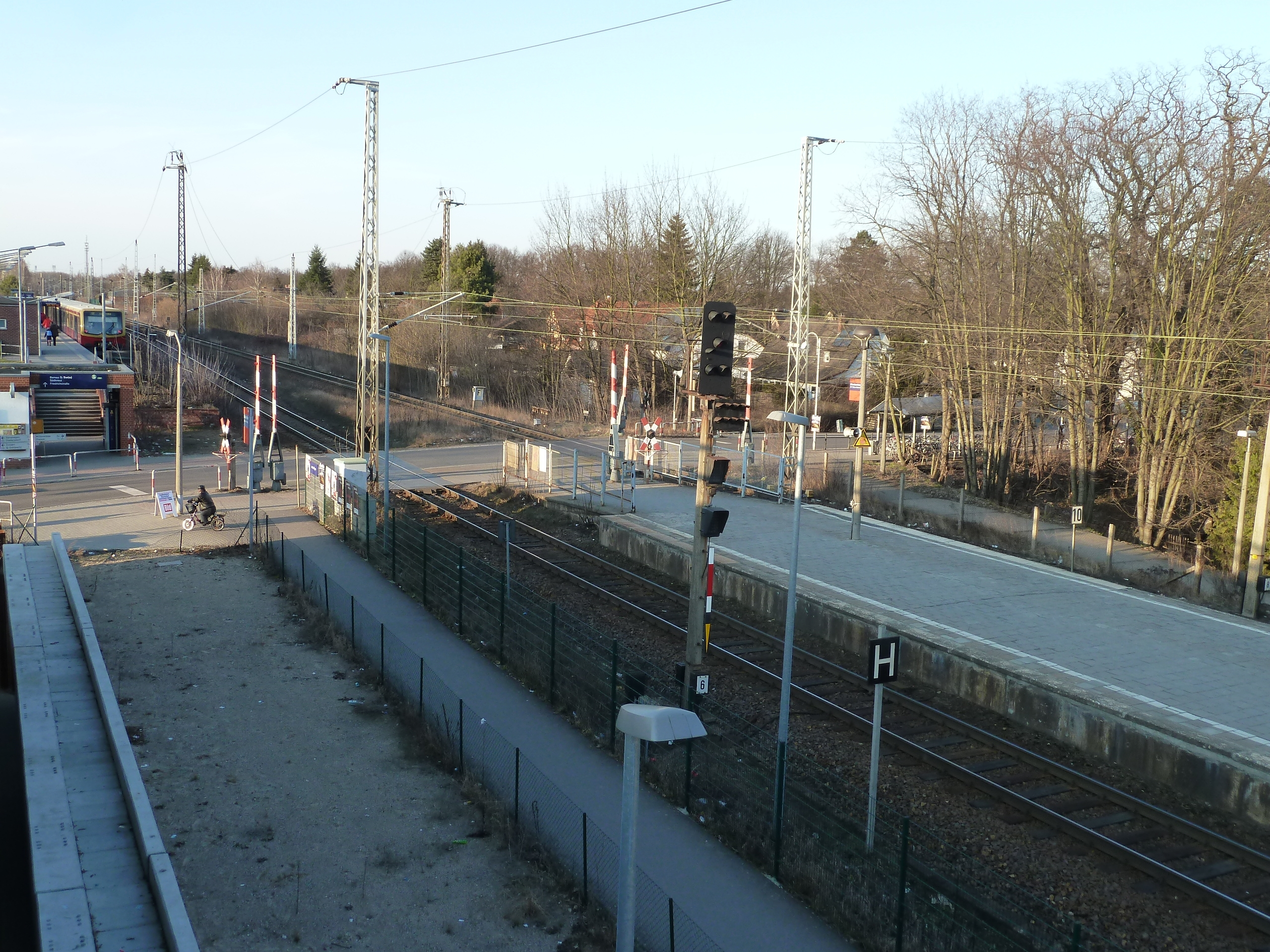 Bahnhof Blankenfelde, Blick auf die Bahnsteige